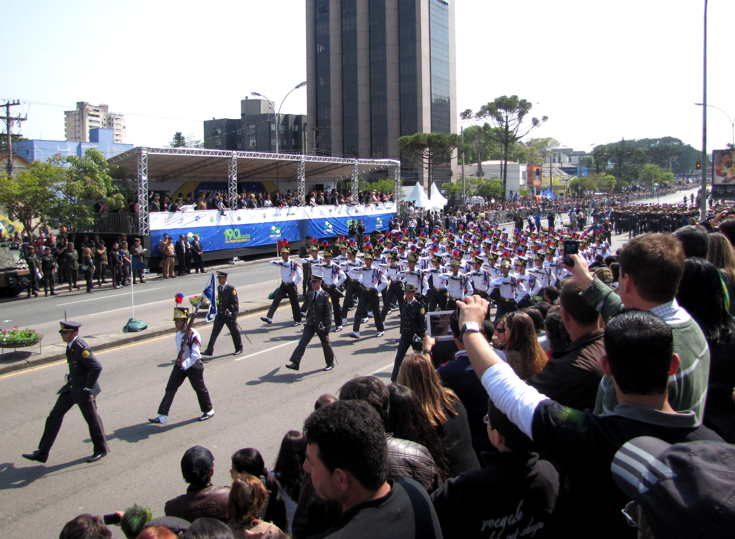 Desfile de 7 de Setembro de 2012 - Escola de Oficiais da PMPR.